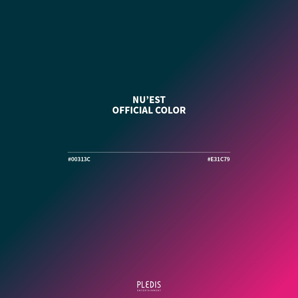 NU’EST Official Colors